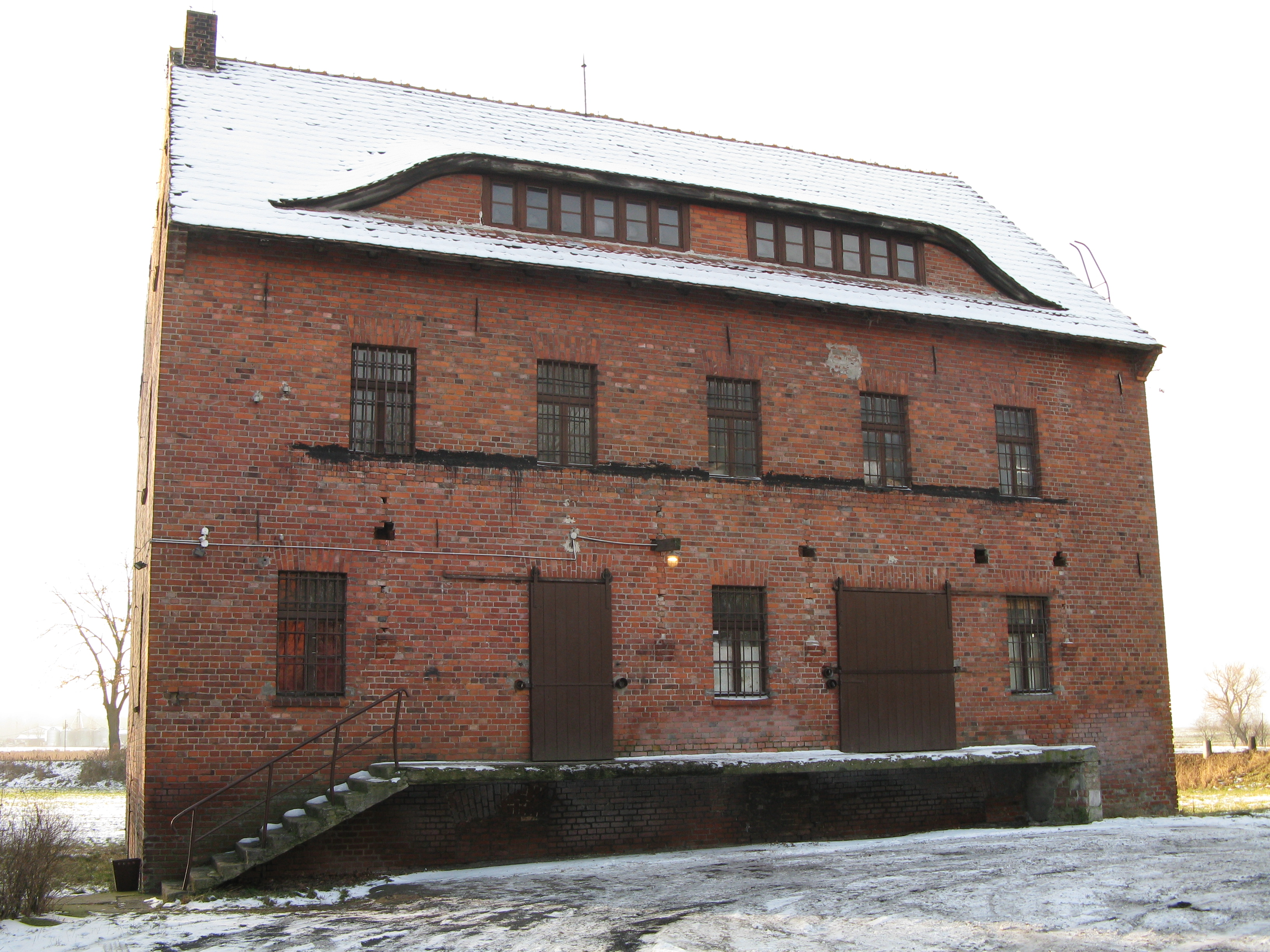 Budynek młyna w Otorowie